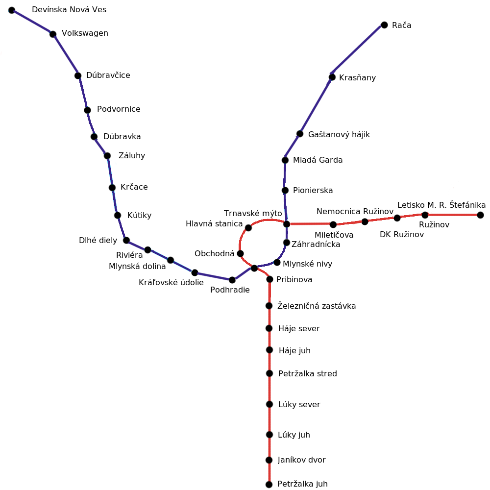 Bratislava metro plan 2020-2030